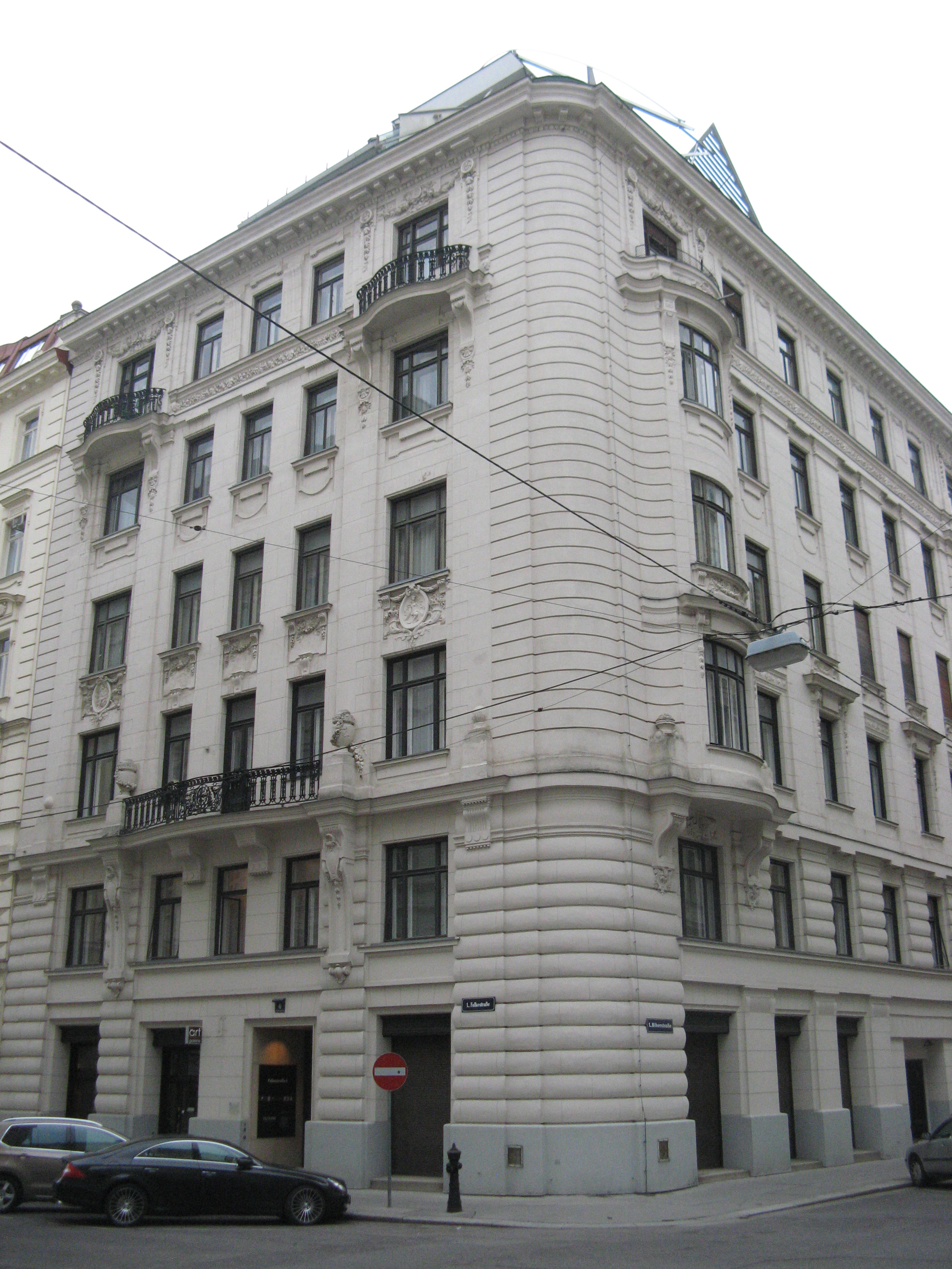 Haus (1902) von Carl Mayer, Falkestraße 6, Wien-Innere Stadt